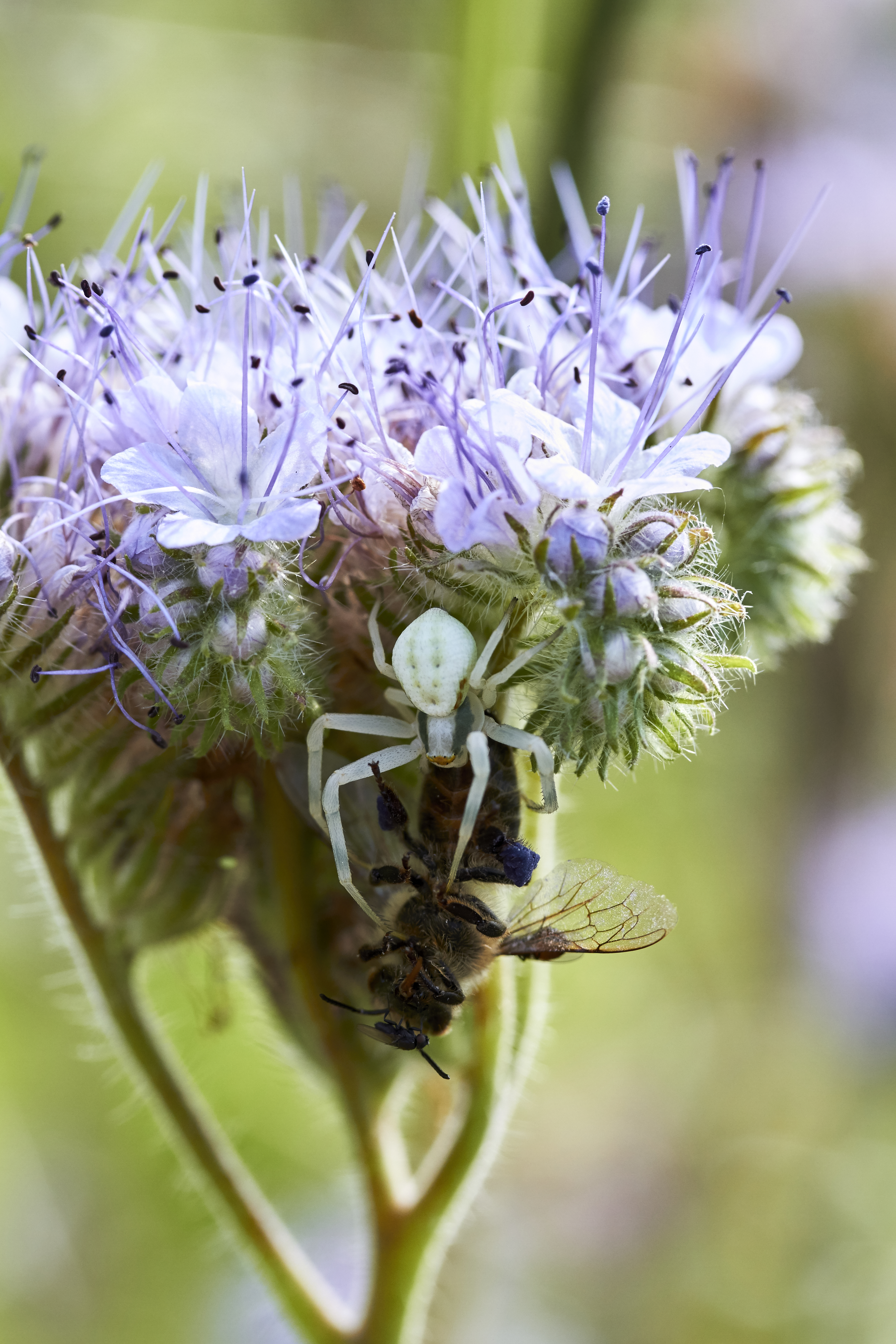 Eine Veränderliche Krabbenspinne (Misumena vatia) mit Beute (Honigbiene) an Phacelia. Die Biene trägt dicke Päckchen blauer Pollen an ihren Beinen. Noch während die Spinne ihre Beute aussaugt, setzen sich bereits Fliegen auf den Kadaver.